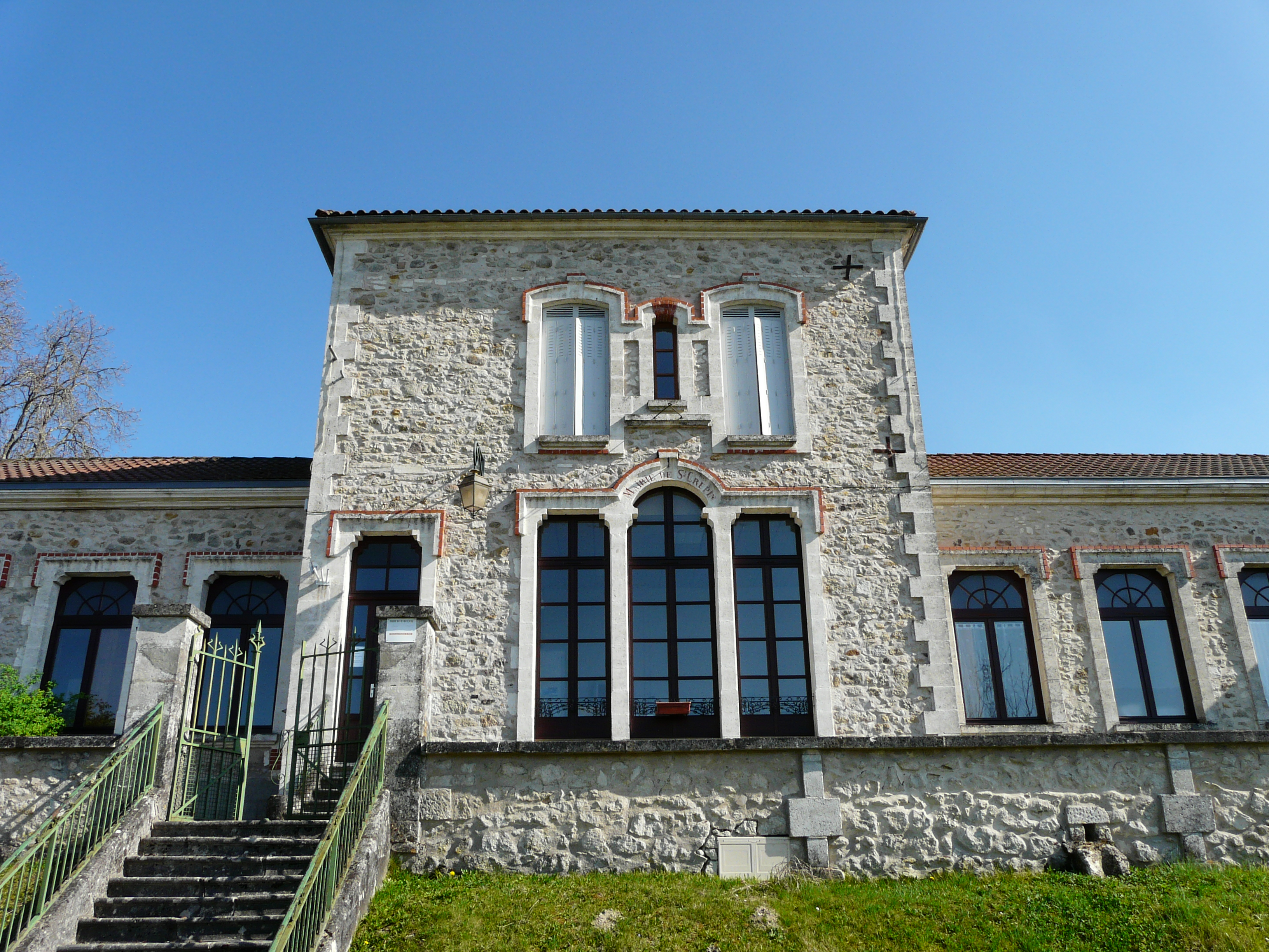 La mairie de Saint-Crépin-de-Richemont, Dordogne, France.